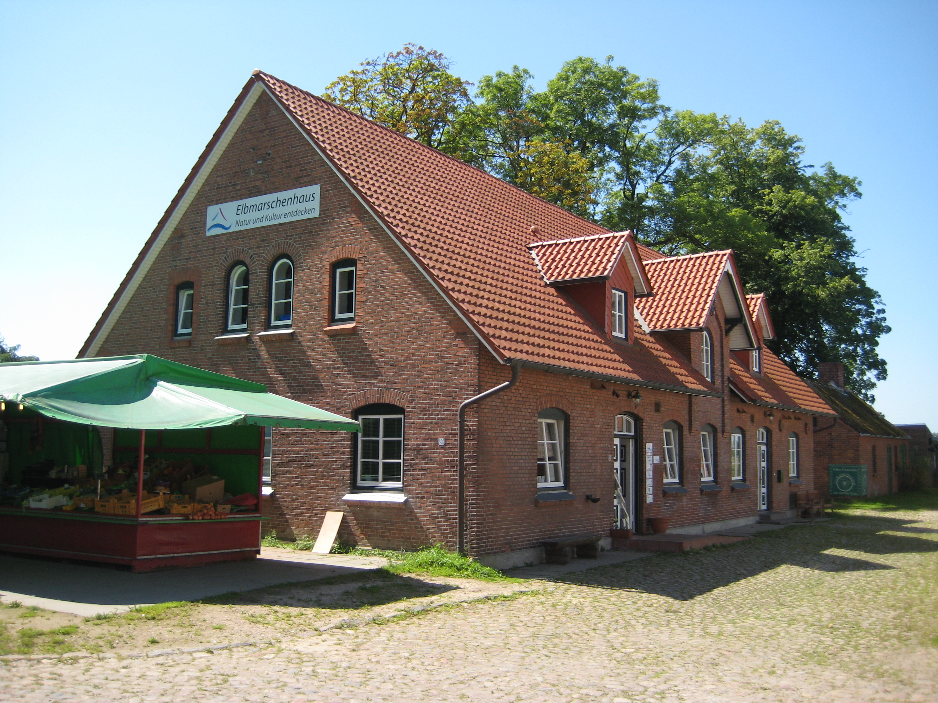 Naturerlebnisraum Elbmarschenhaus in Haseldorf